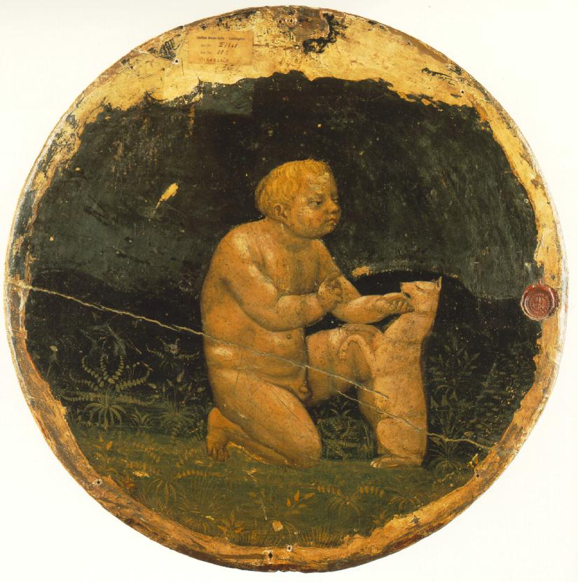 Tondo, backside